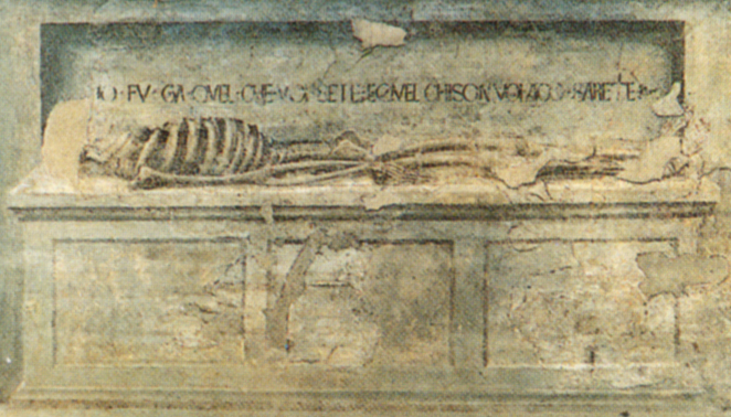 detail